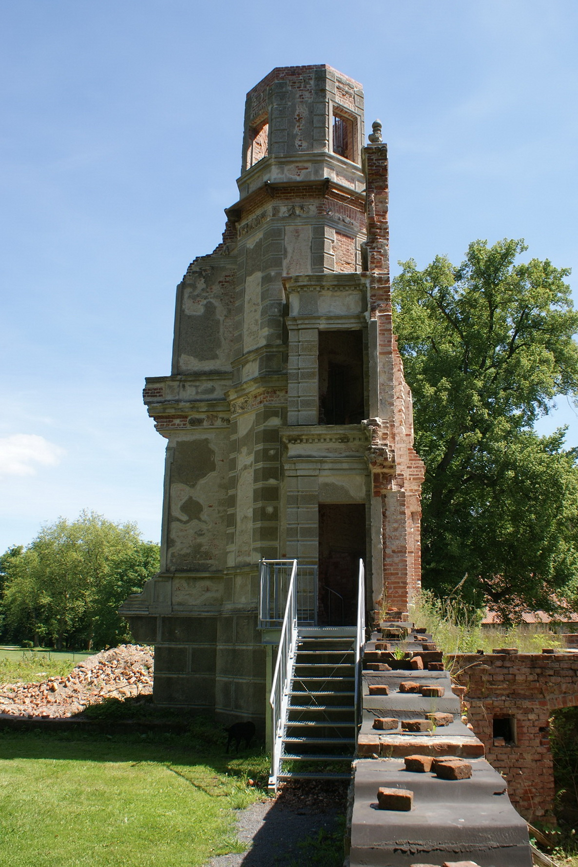 Pansevitz, Landkreis Vorpommern-Rügen. Ruine des ehemaligen Herrenhauses.